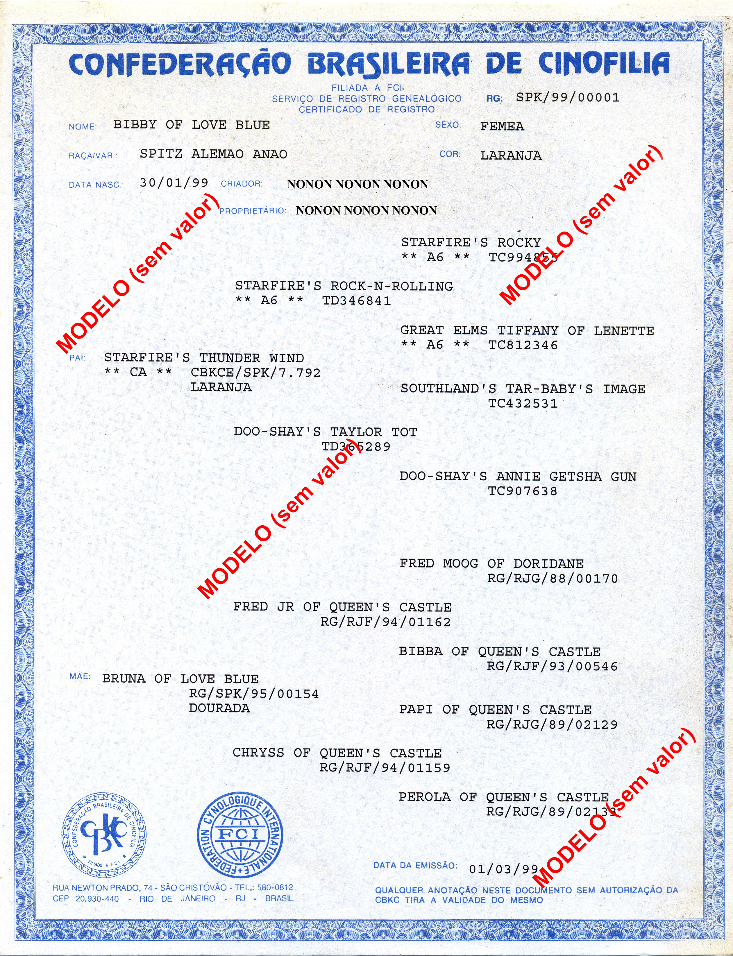 Pedigree (frente do documento) emitido pela Confederação Brasileira de Cinofilia orgão Brasileiro filiado a (Fédération Cynologique Internationale, "SPK" sigla do Kennel Clube da Cidade de Avaré